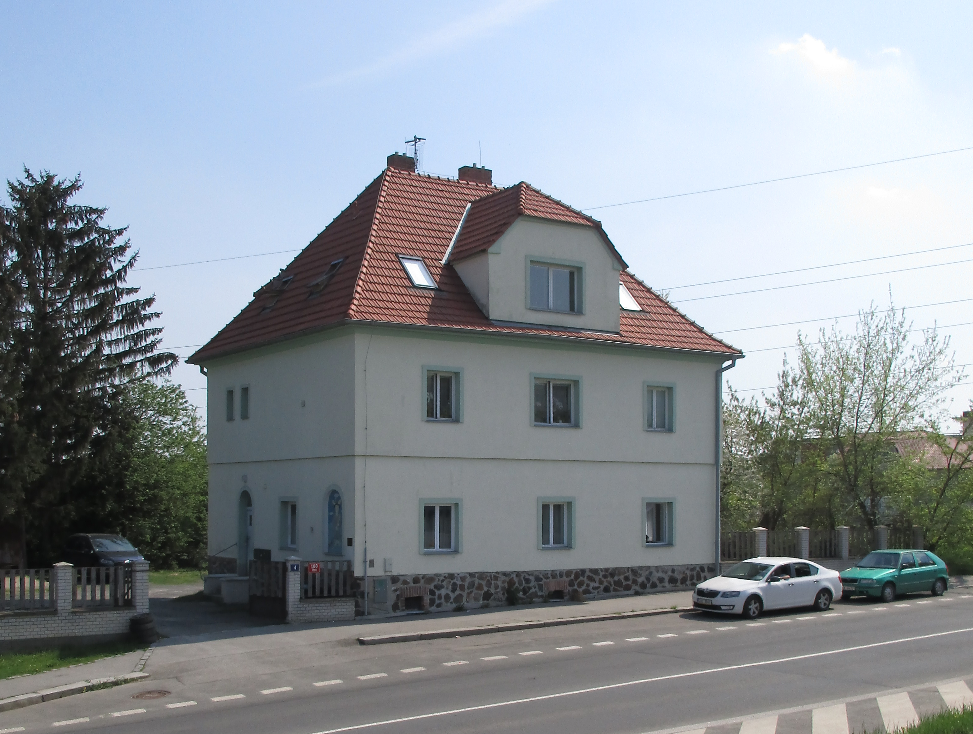 Praha 8-Ďáblice, Ďáblická 160/4. Budova bývalého akcízu.